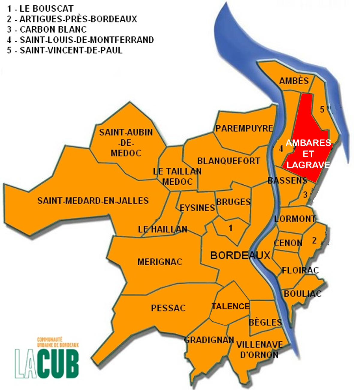 Situation d'Ambarès au sein de la Communauté Urbaine de Bordeaux / Location of Ambarès in the Urban Community of Bordeaux